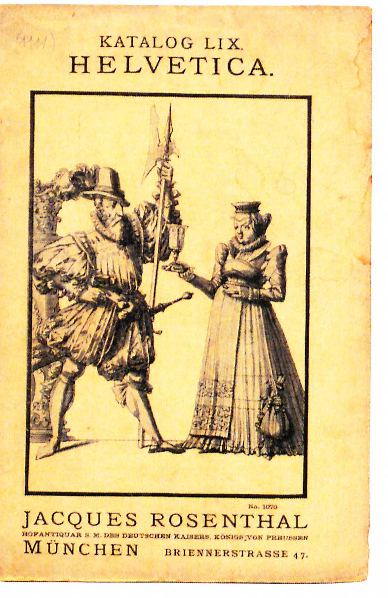 Jacques Rosenthal Katalog 59 1911